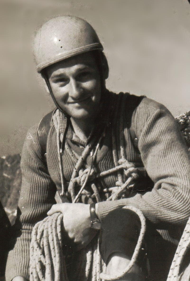 Milan Kriššák (* 30. január 1944 Stráže pod Tatrami, Slovensko – † 2. júl 1979), popredný slovenský horolezec, tréner, skialpinista, horský vodca a člen Horskej služby TANAPu.